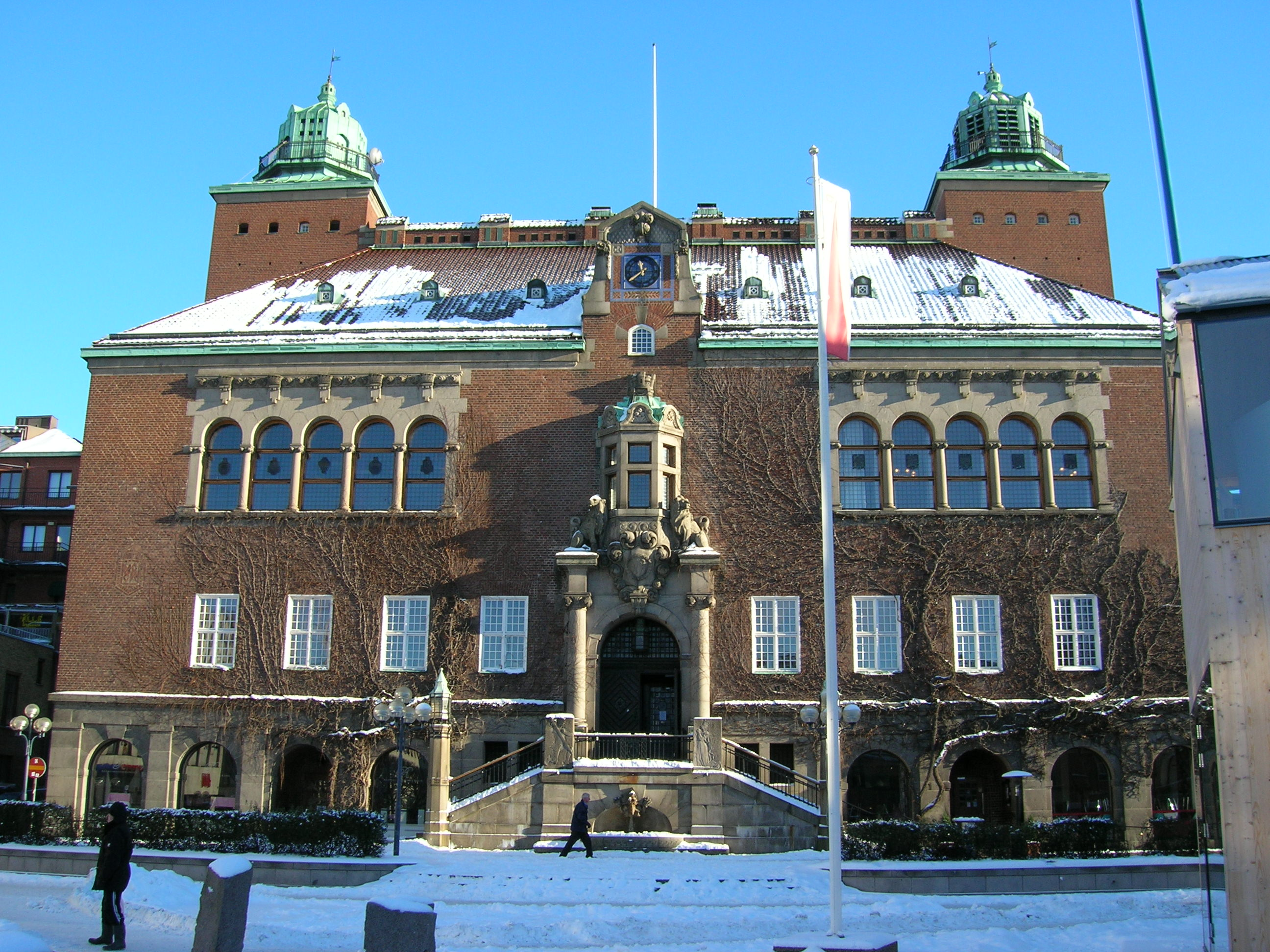 Borås rådhus i januari 2006 Foto: Niklas Nordblad